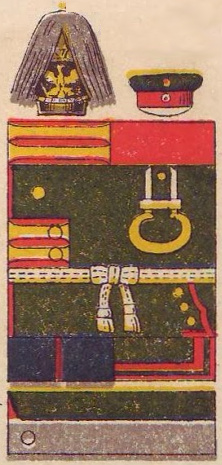 Schematische Farbdarstellung der Uniform des preußischen Feldjäger-Corps - dies waren grundsätzlich Offiziere: Grüner Waffenrock mit roter Paspelierung und hochrotem Kragen mit gelben Litzen; rote schwedische Ärmelaufschläge mit gelben Litzen; grüne Epauletten mit gelber Bordierung; Pickelhaube mit preußischem Adler, bei Paraden mit Haarbusch.